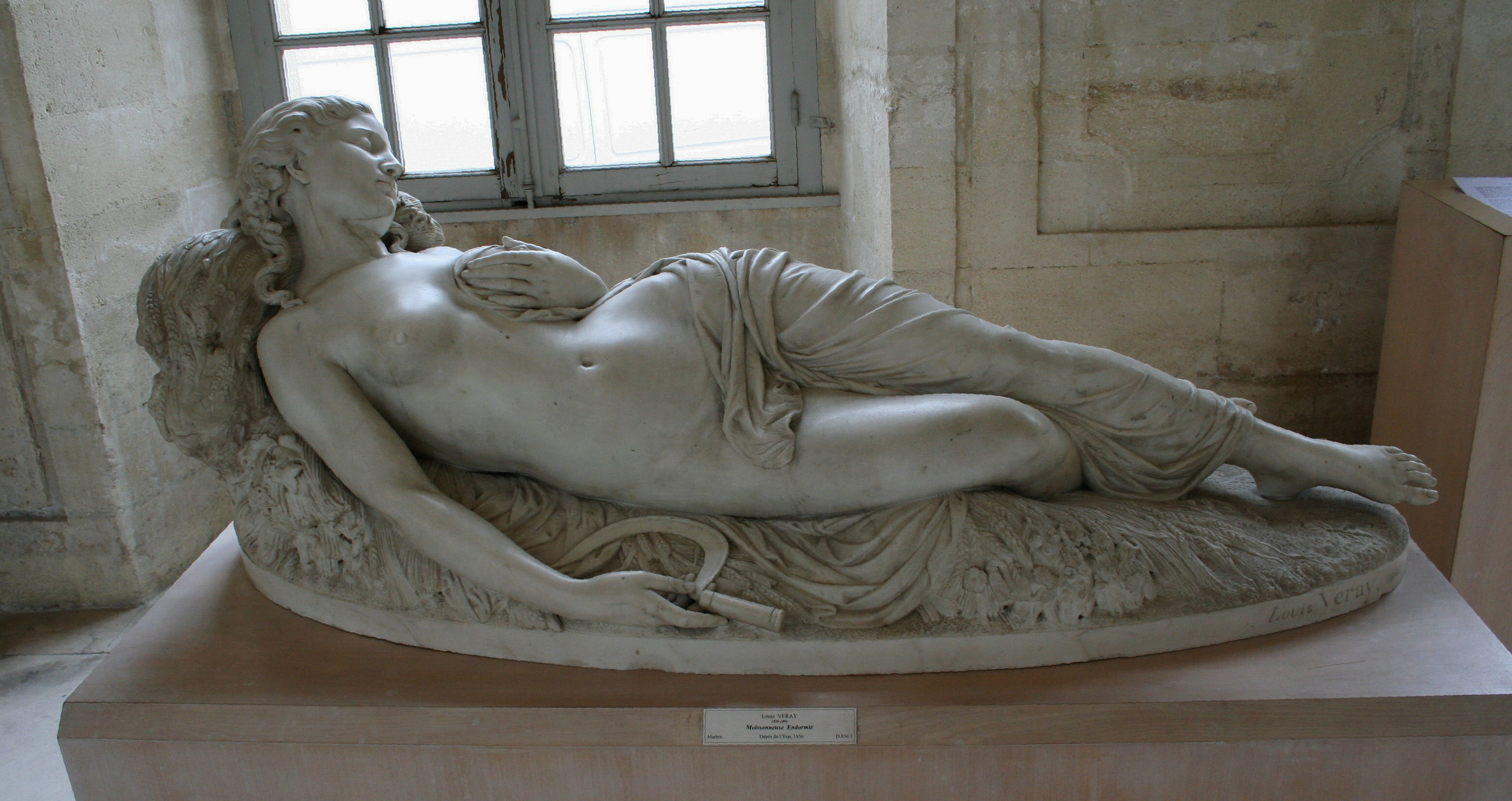 Louis Veray (1820-1891), Moissonneuse endormie, 1855, statue en marbre, Height: 65 cm (25.5 in); Width: 165 cm (64.9 in); Depth: 60 cm (23.6 in) dimensions QS:P2048,65U174728;P2049,165U174728;P2610,60U174728, Avignon, musée Calvet.